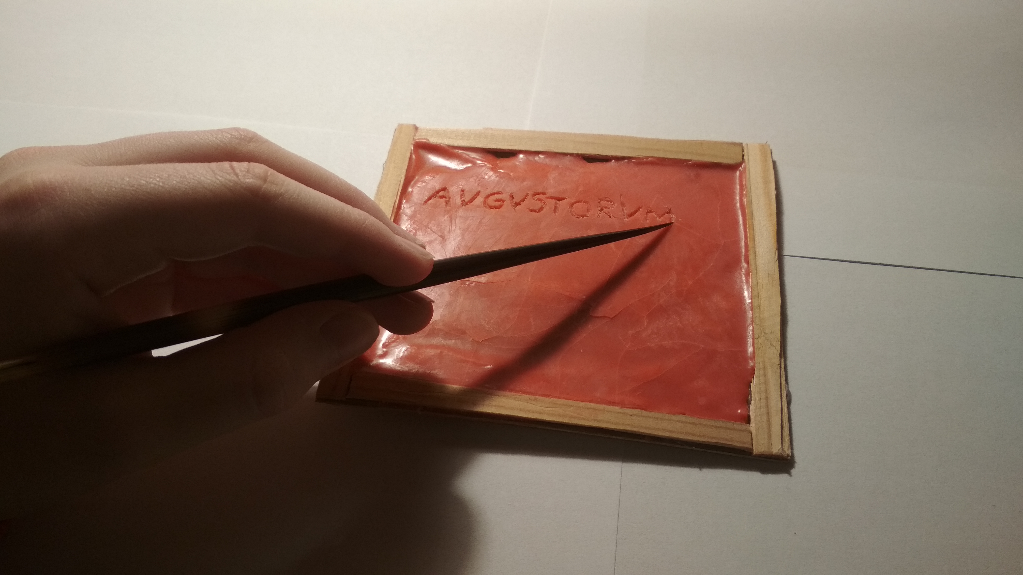 Ruka píše na domácí voskovou tabulku AVGVSTORVM.